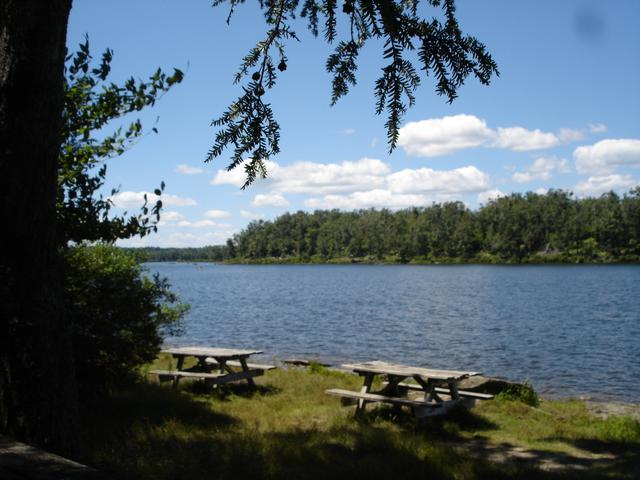 Hồ Jean